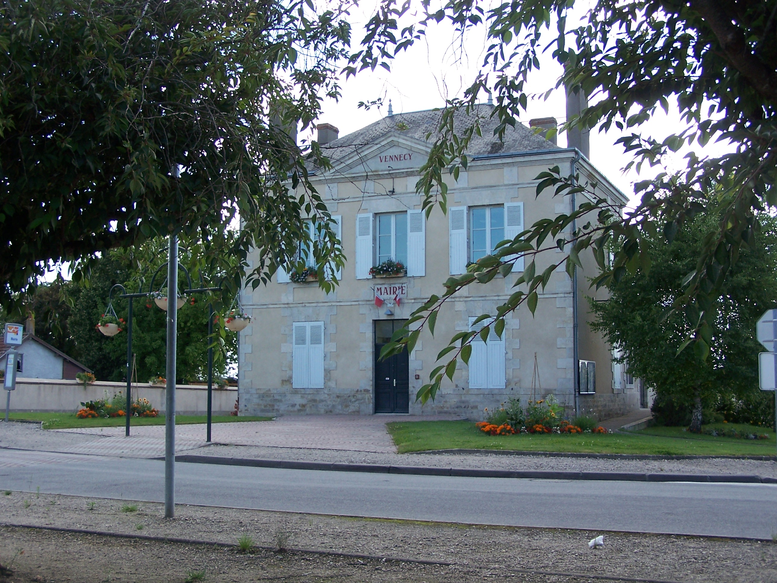 City hall of VENNECY